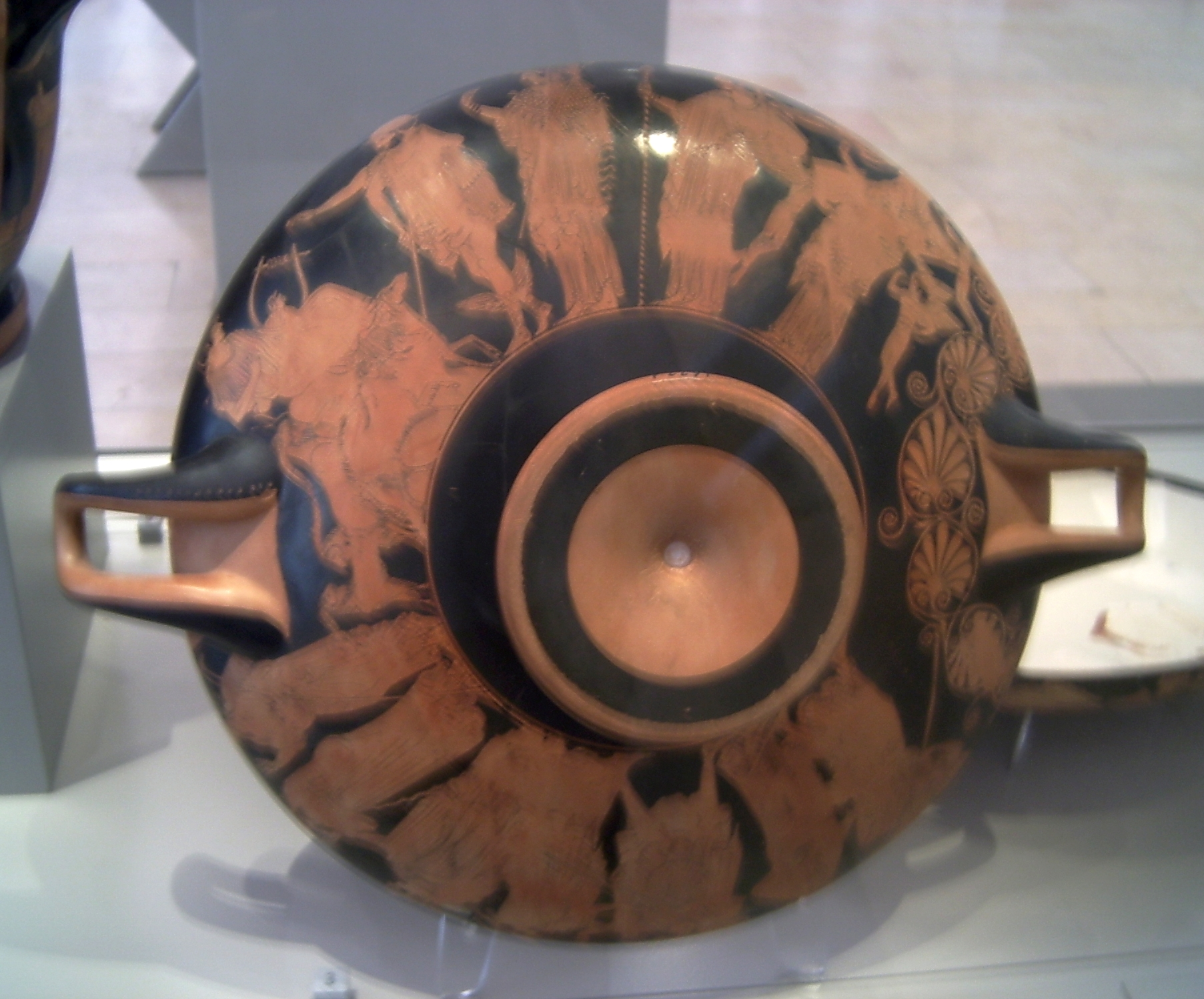 Urteil des Paris und Entführung der Helena, vom Töpfer Hieron signierte und dem Maler Makron zugeschriebene Kylix, um 490-480 v. Chr., gefunden in Vulci